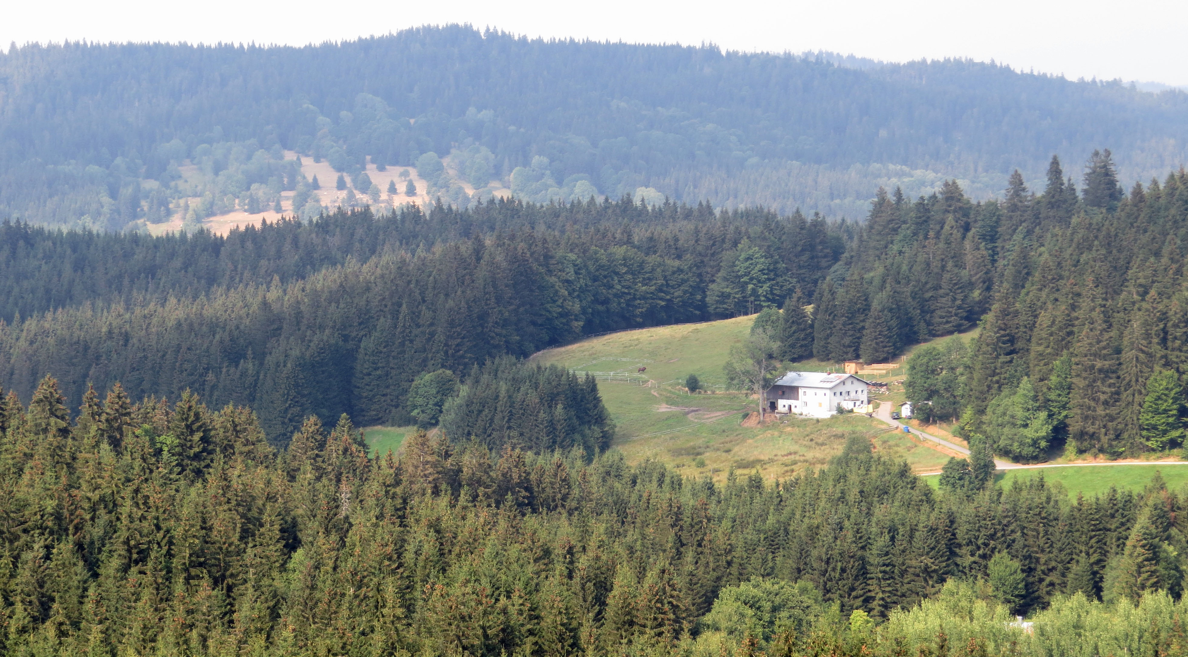 Bei Vorderfirmiansreut, Philippsreut